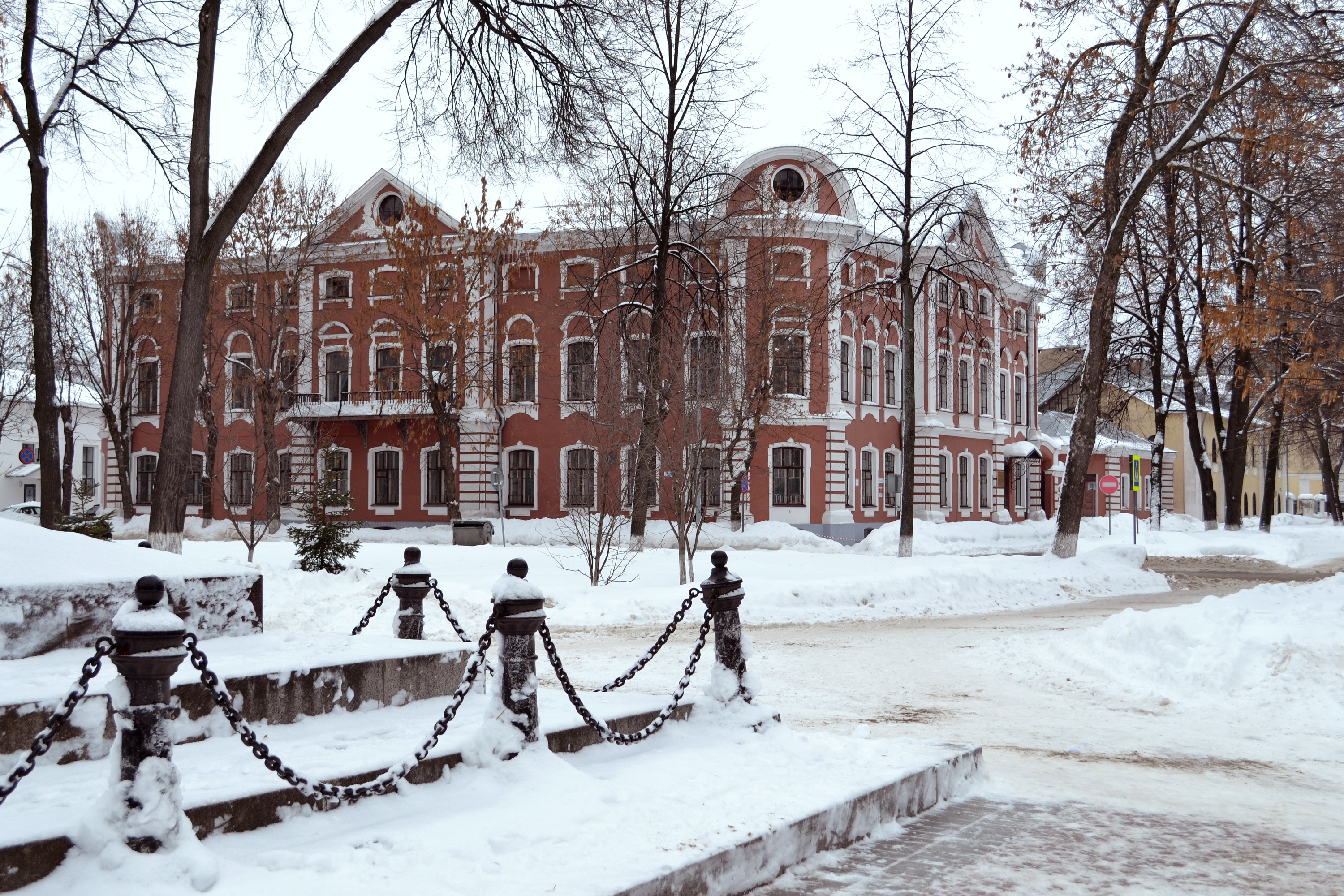 Усадьба Вахрамеева: улица Челюскинцев, 12, Ярославль, Ярославская область